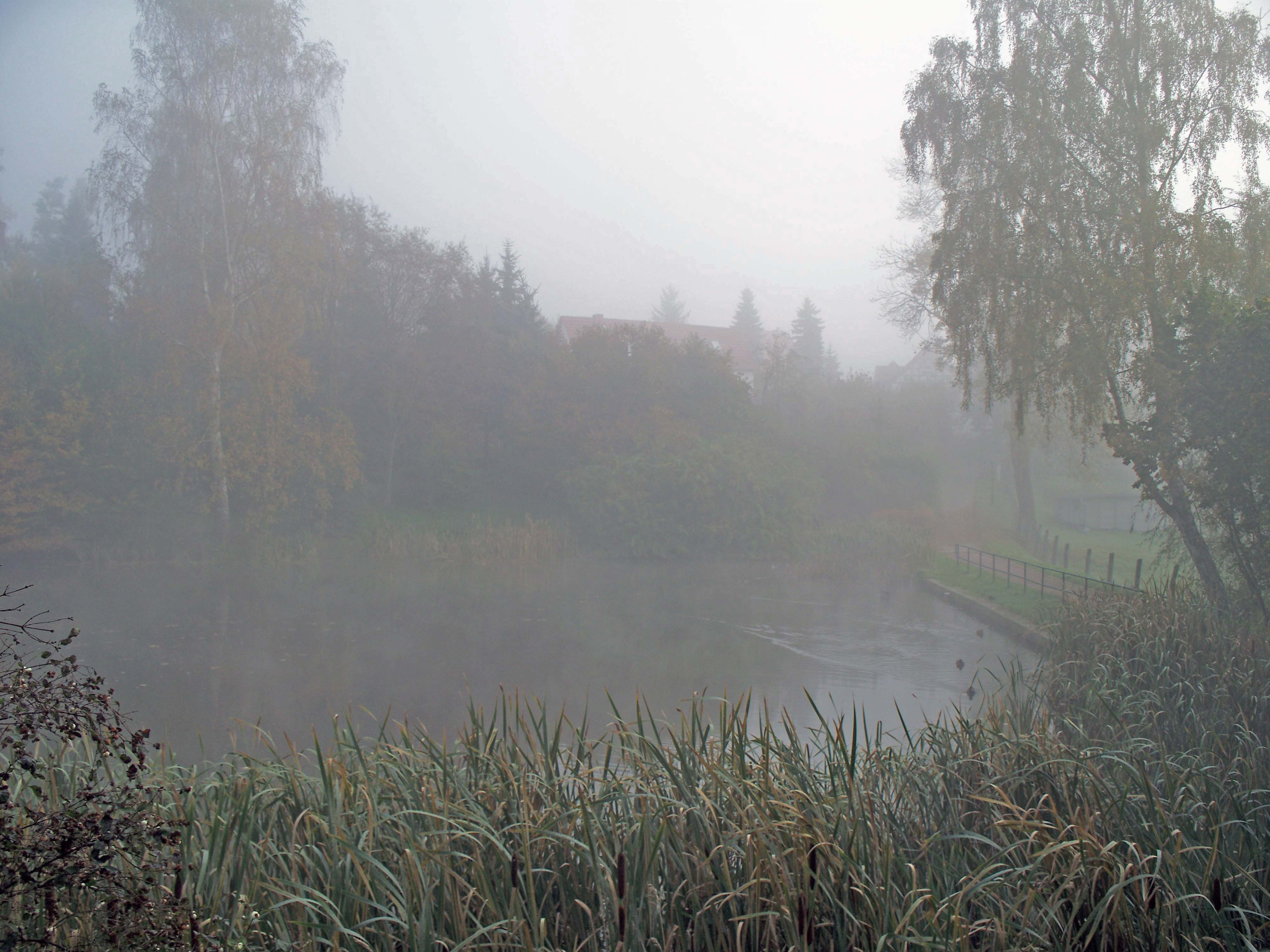 Kurpark Bad Klosterlausnitz